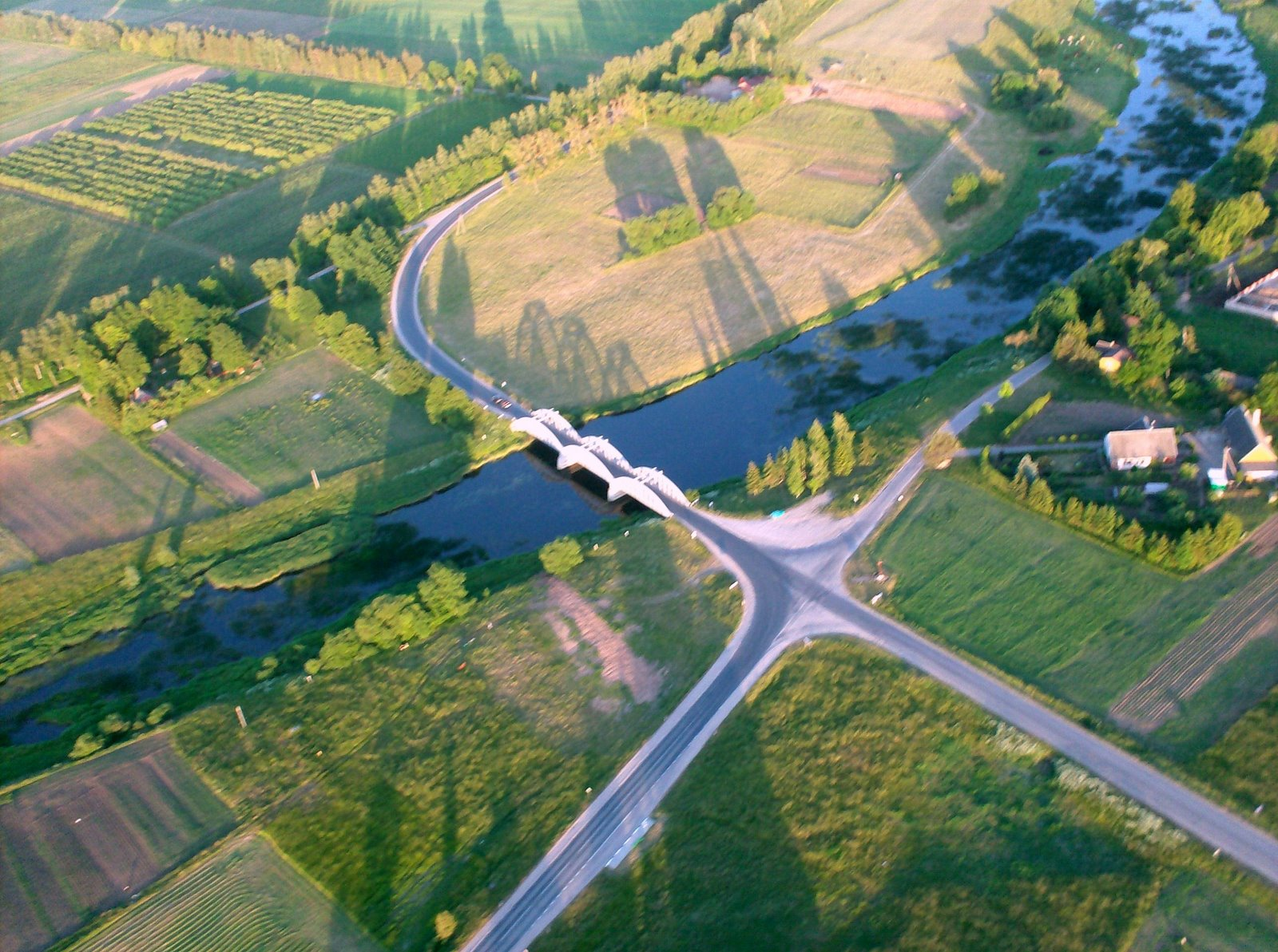 Autorius as.